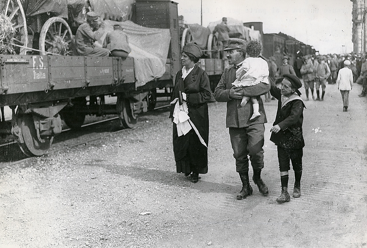 Treno con militari e civili alla stazione